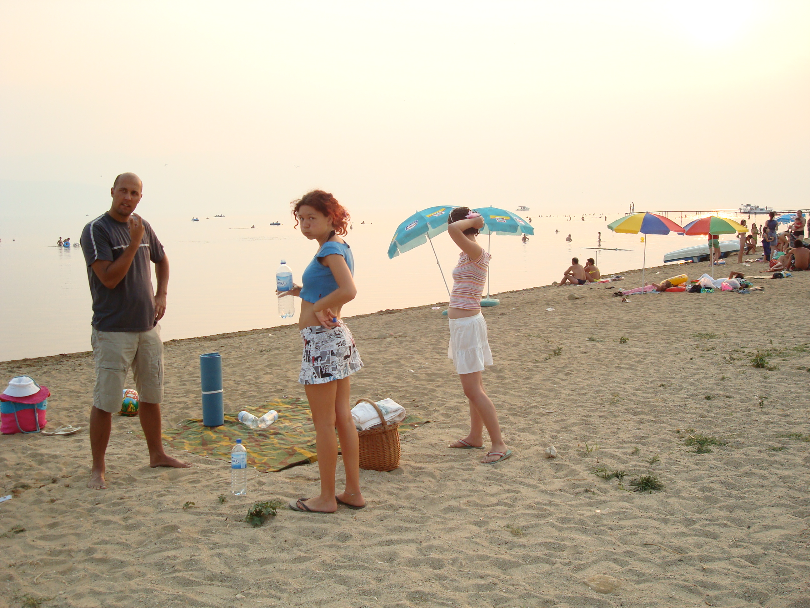 Плажа Претор, преспанско језеро, Македонија.